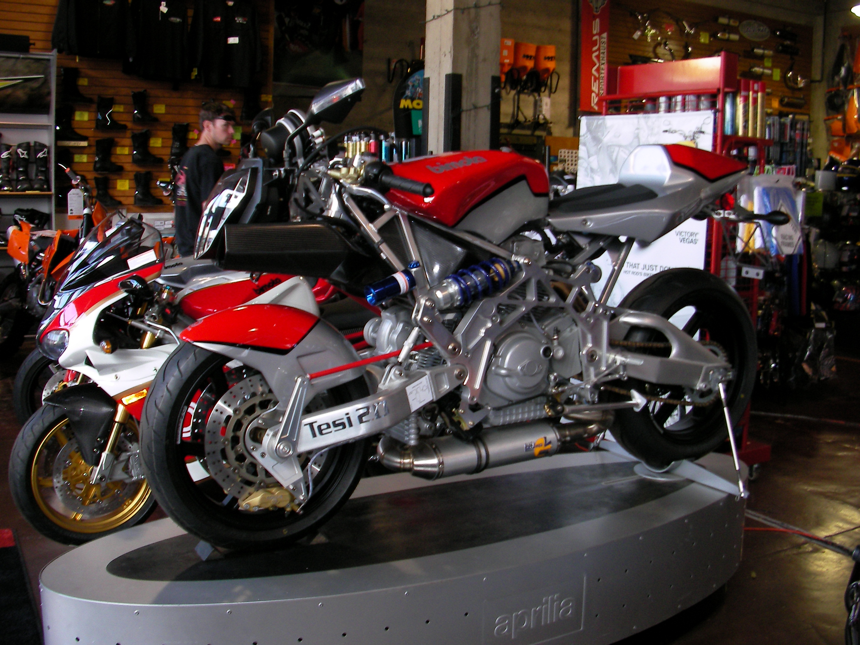 Bimota Tesi 2D